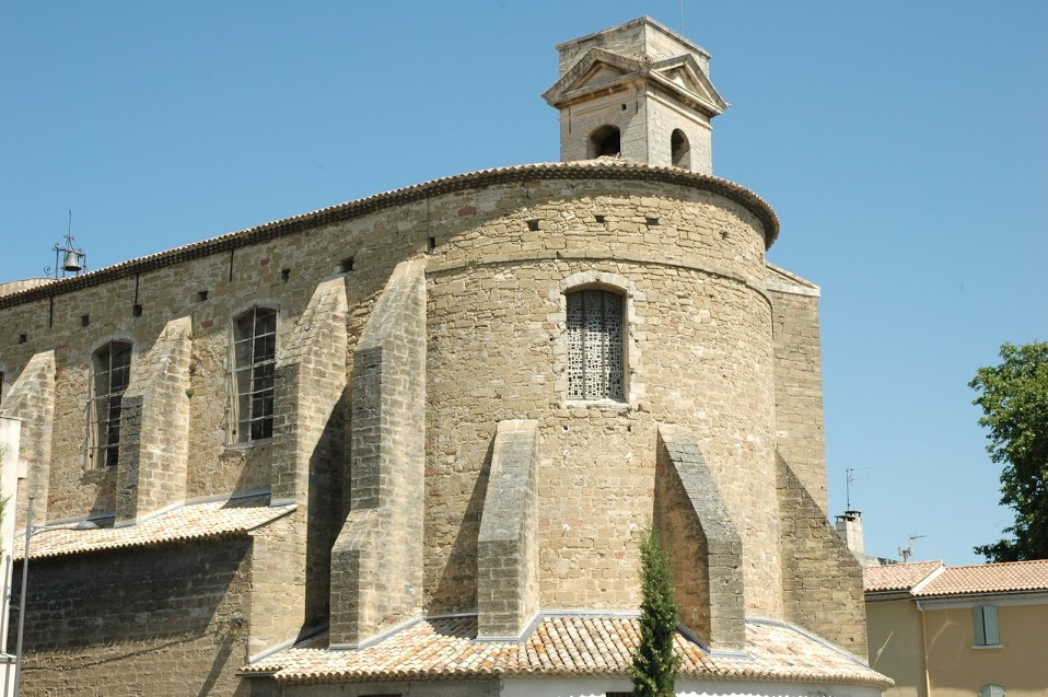 Eglise de Sorgues